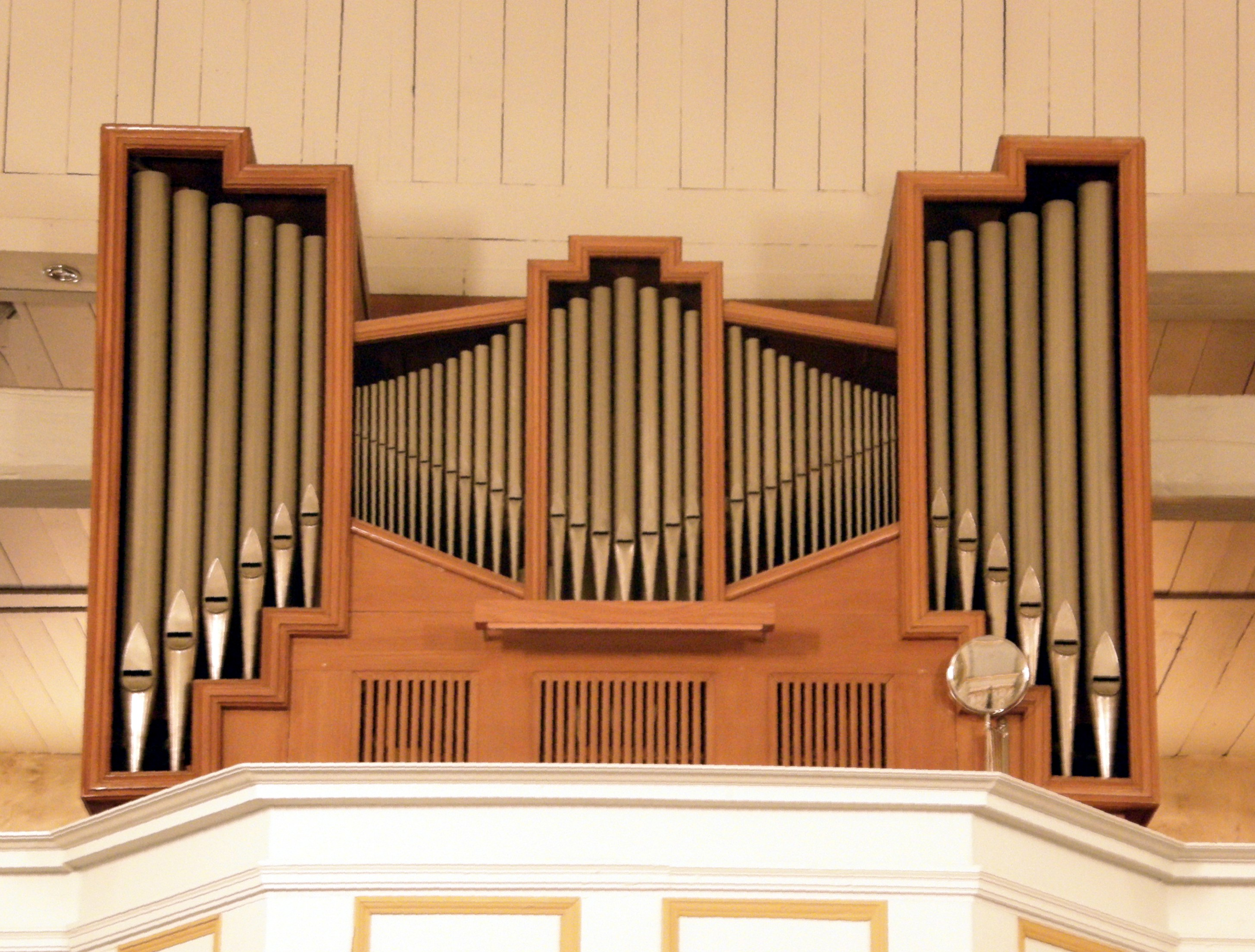 Falkenhagener Dorfkirche, Orgel